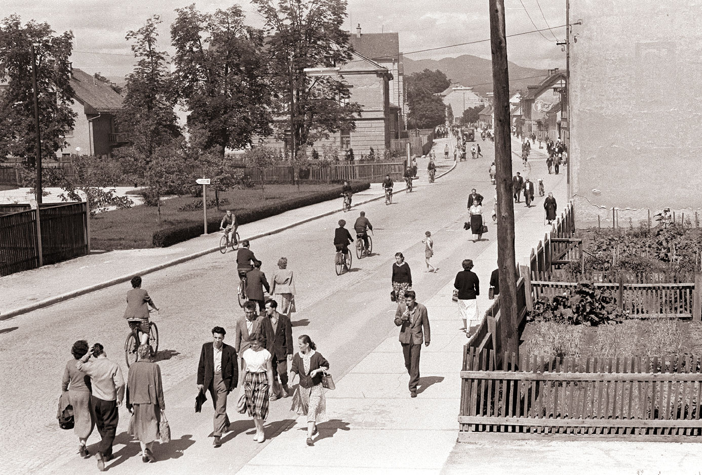 Mariborska cesta v Celju polna kolesarjev in pešcev